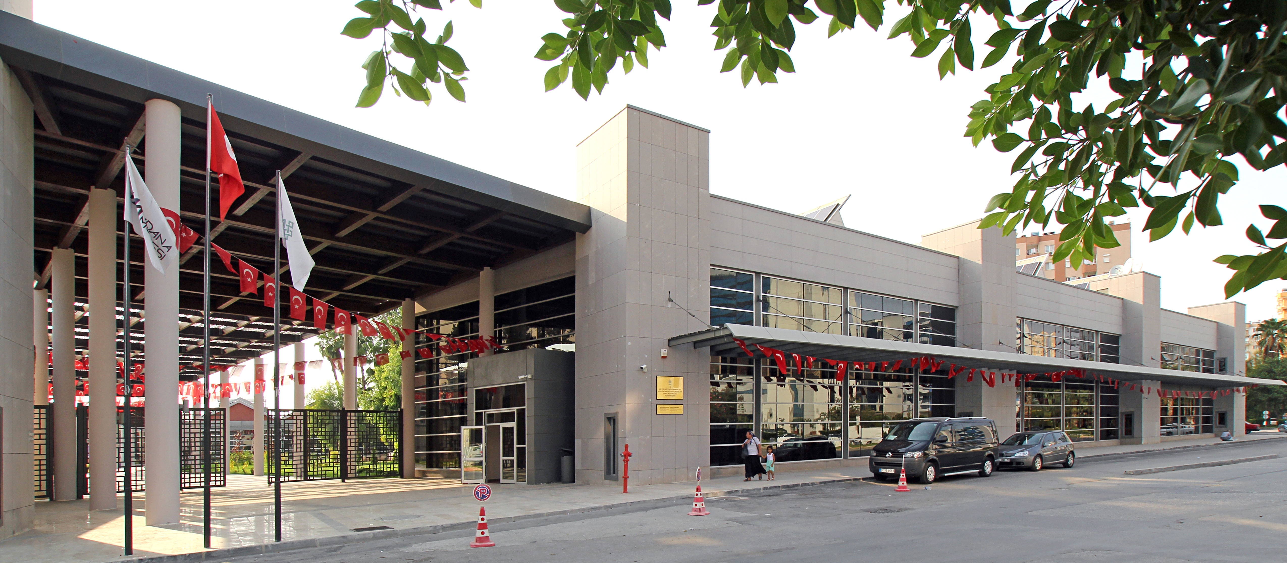 Archäologisches Museum Adana, Südtürkei, neues Gebäude seit 2017